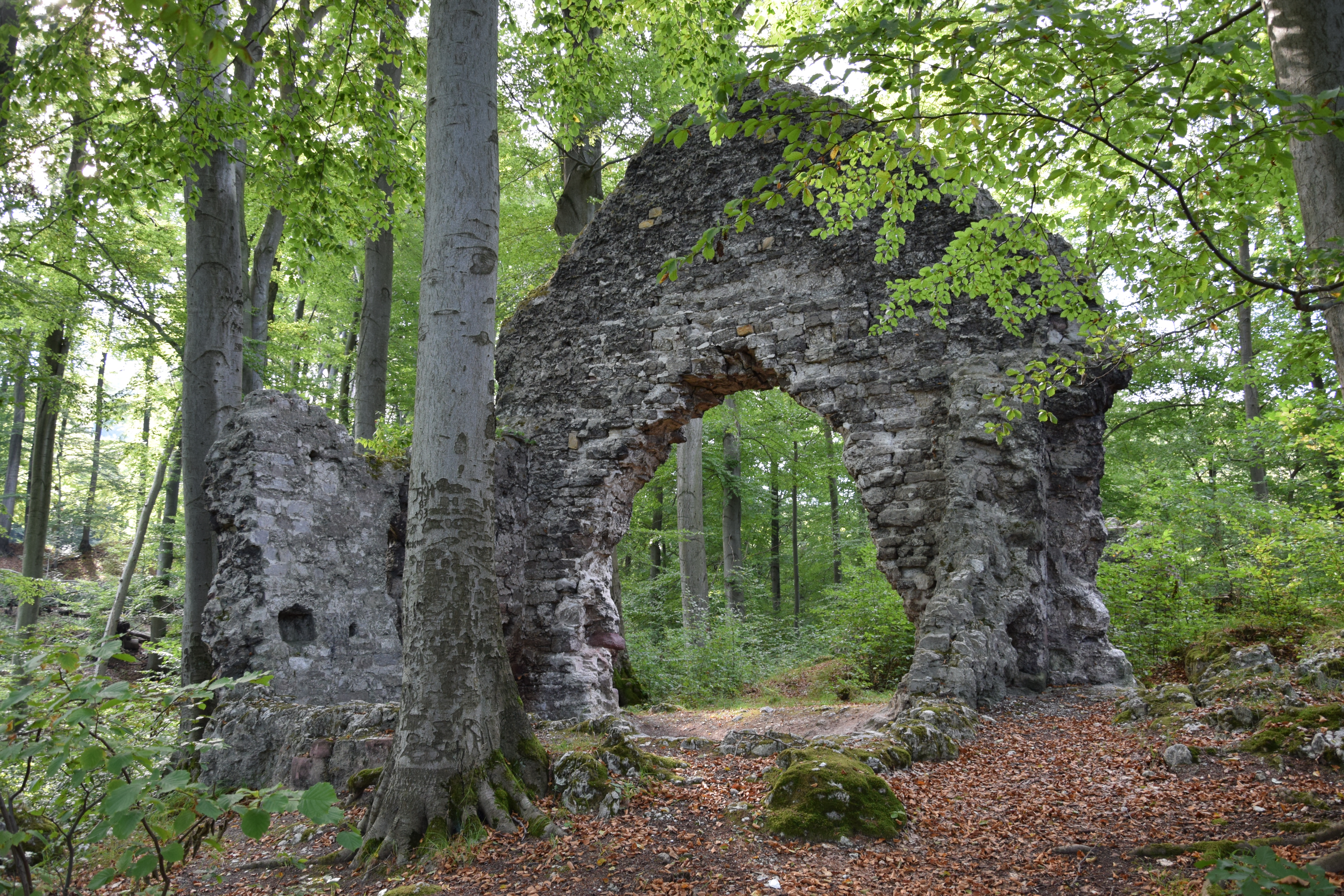 Die Grasburg bei Rottleberode - Giebelwand und Chor